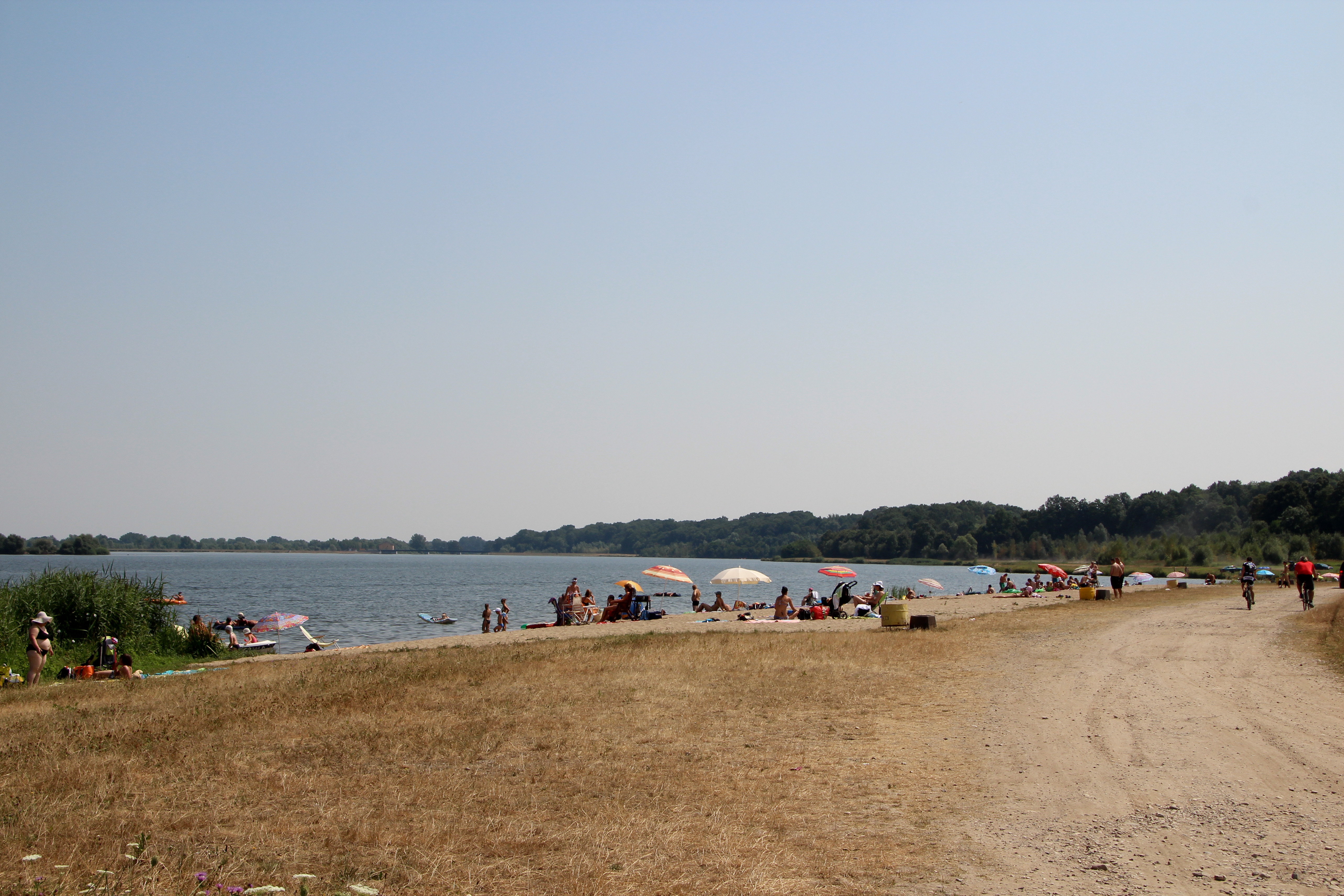 Kozielno – wieś w Polsce, w województwie opolskim, w powiecie nyskim, w gminie Paczków.